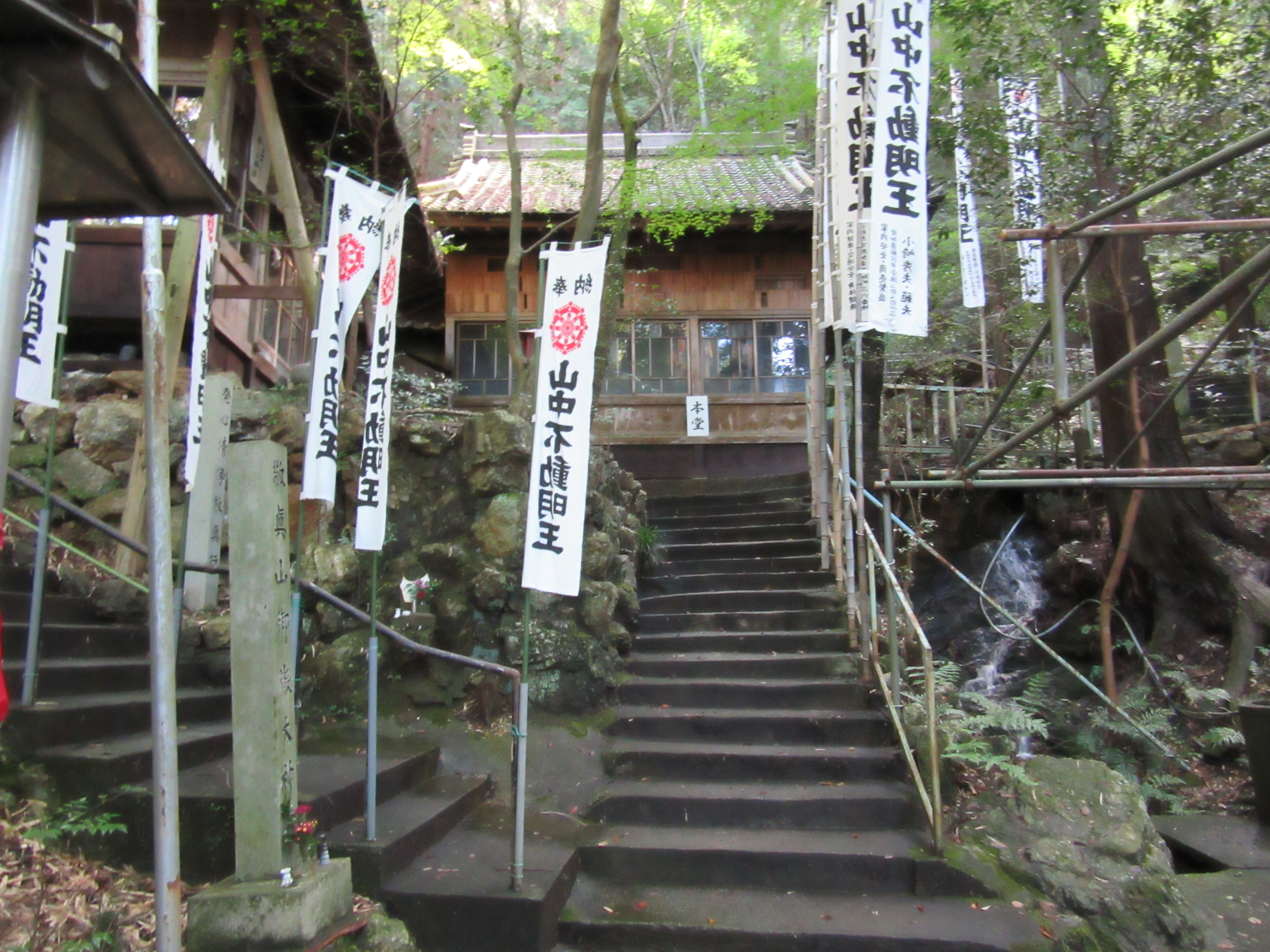 山中不動。